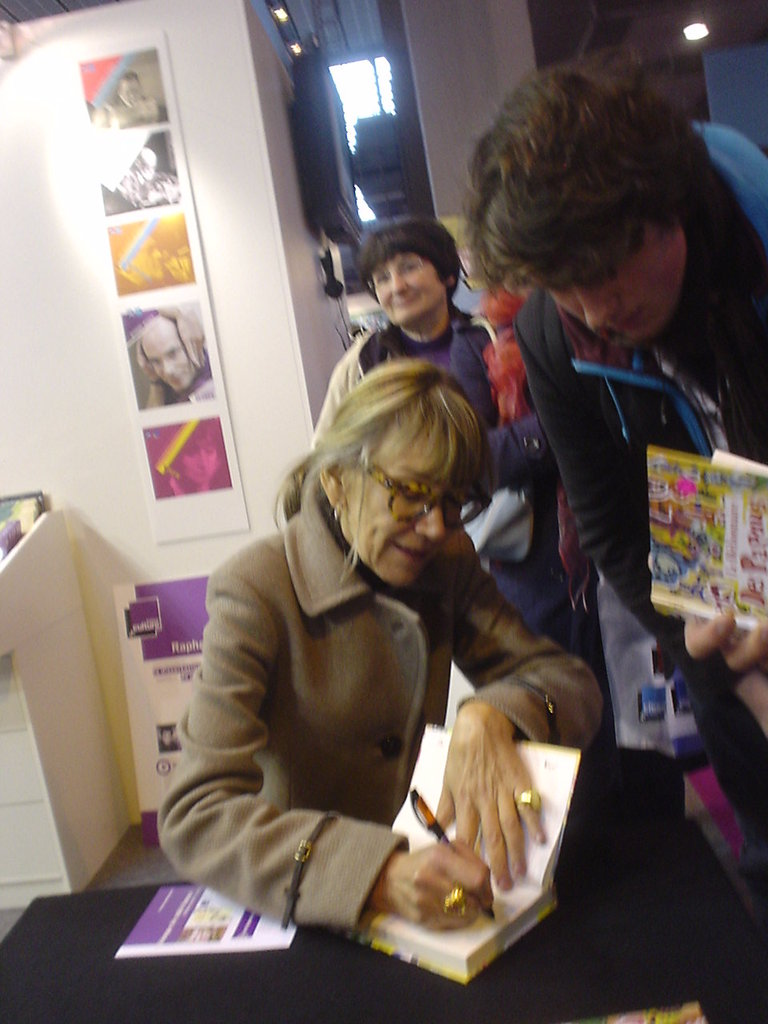 Dominique Muller au Salon du Livre à Paris en 2010.